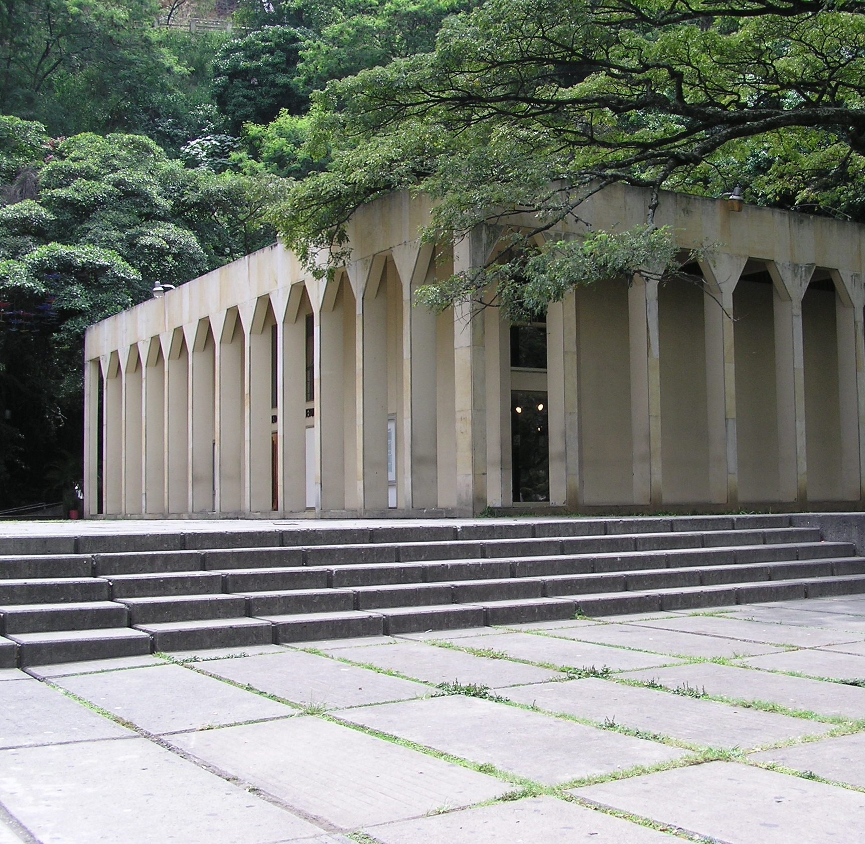 Modern Art Museum "La Tertulia" Santiago de Cali - Colombia